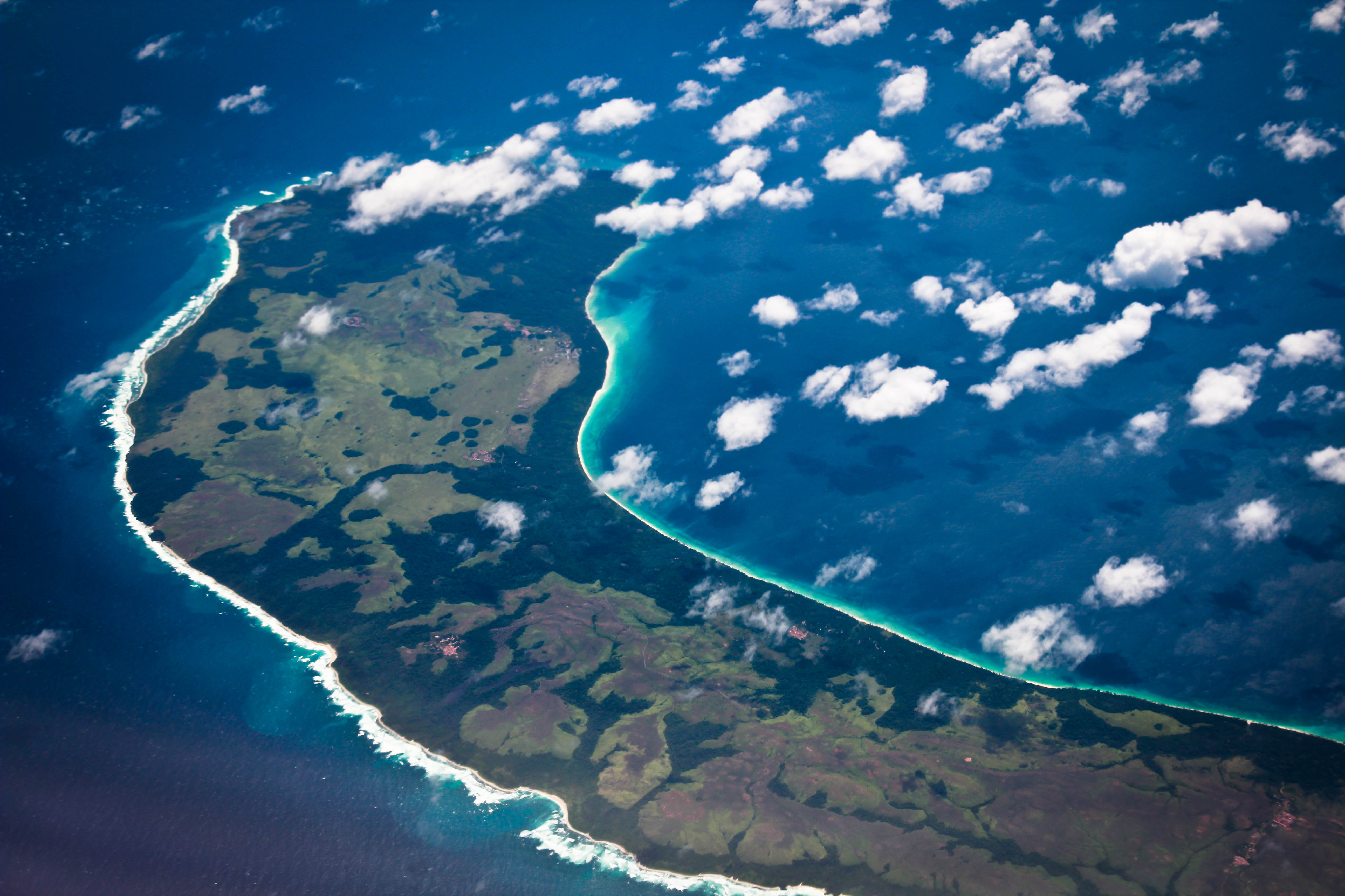 Teressa, Nikobaren